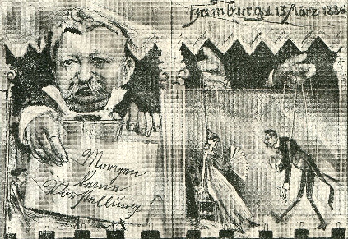 Deckblatt einer Tanzkarte für ein Fest des Vereins für Kunst und Wissenschaft Hamburg 1886